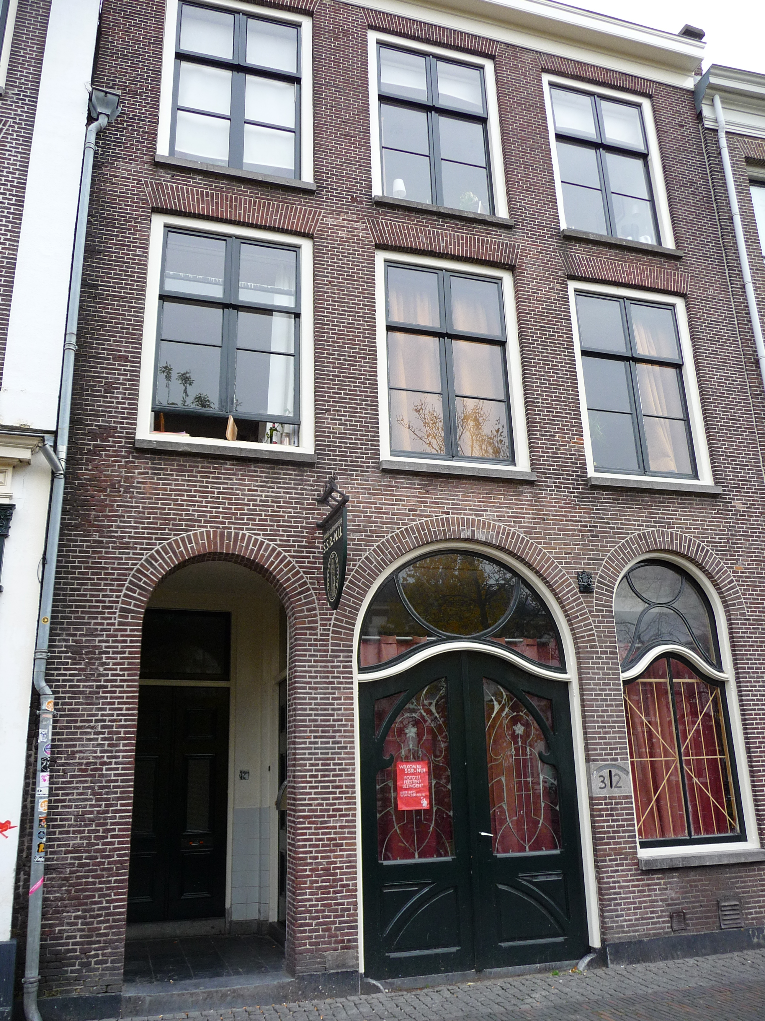 Rijksmonument aan de Oudegracht in Utrecht